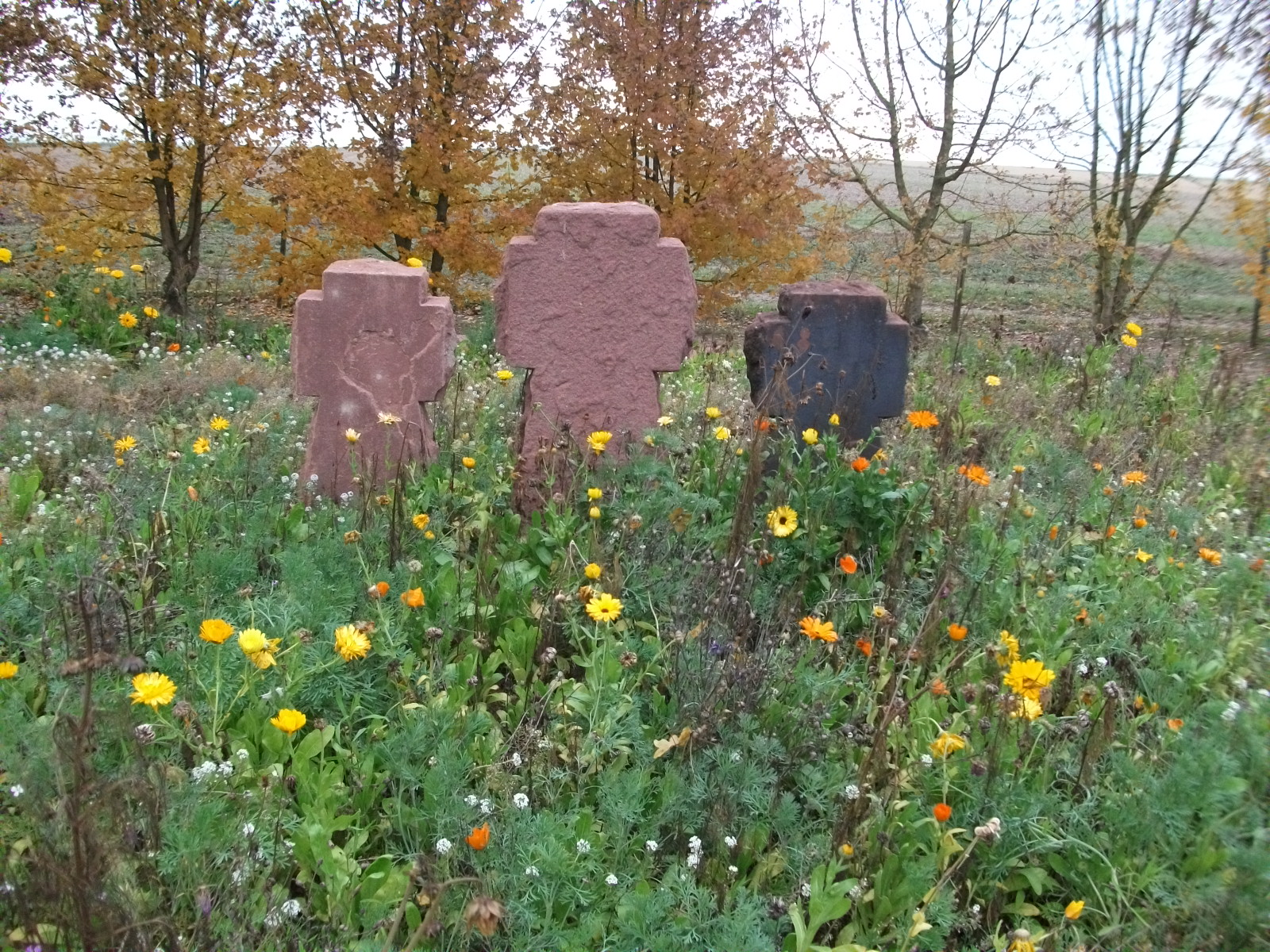 Nécropole nationale (Aubérive), partie à gauche et paysagée du monument allemand.